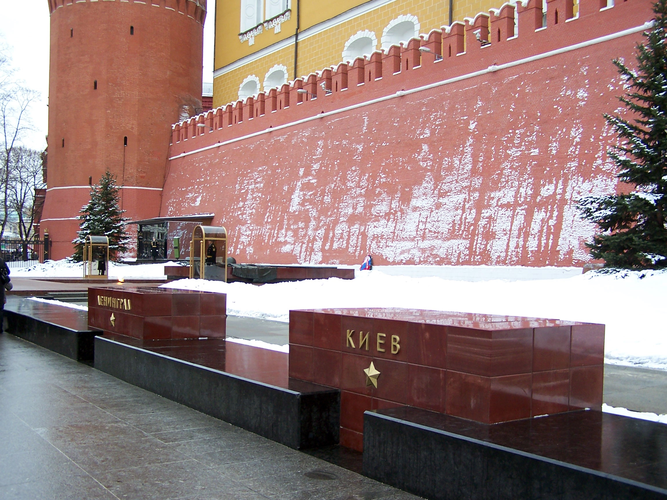 Мемориал